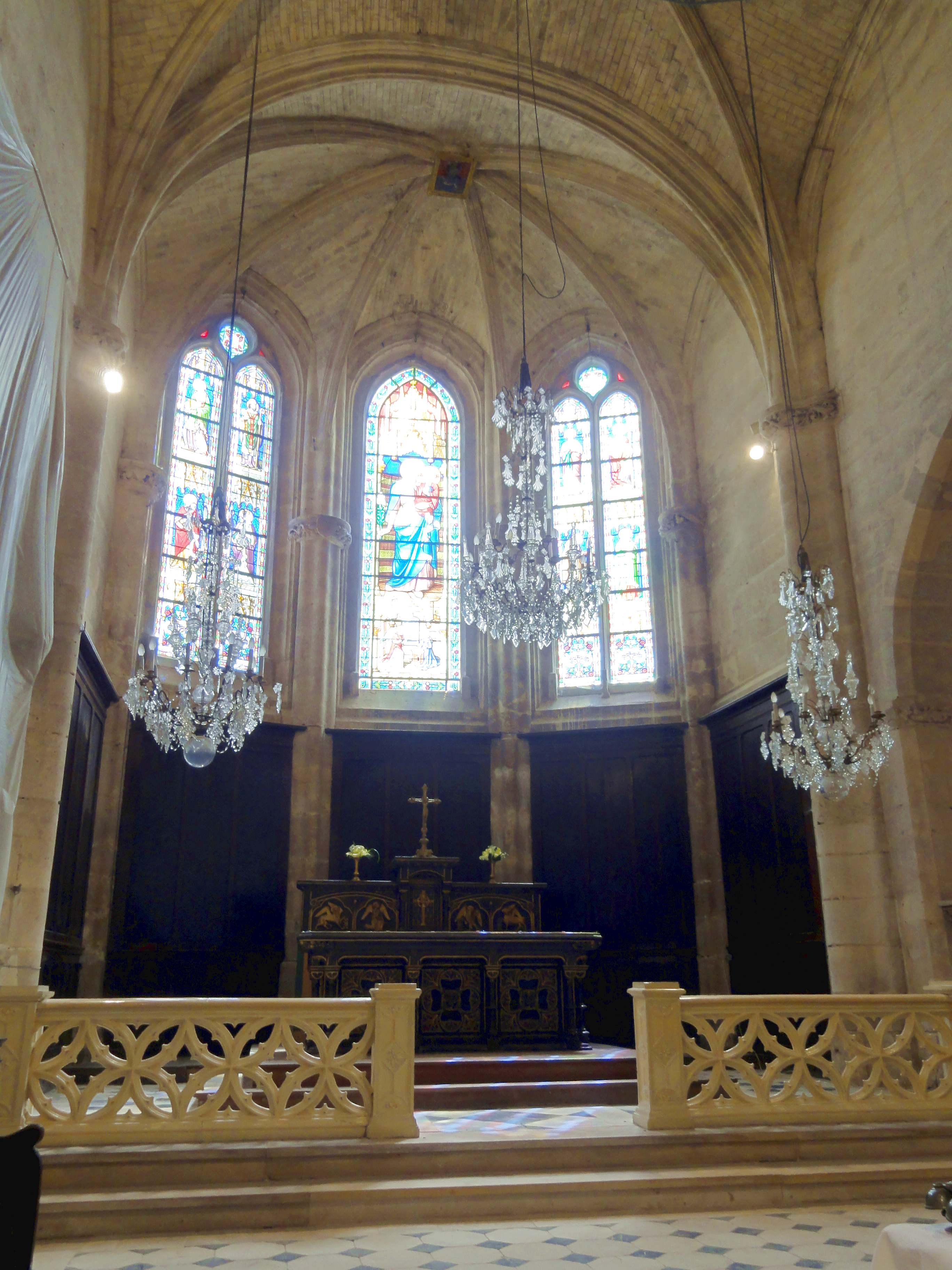 Abside.